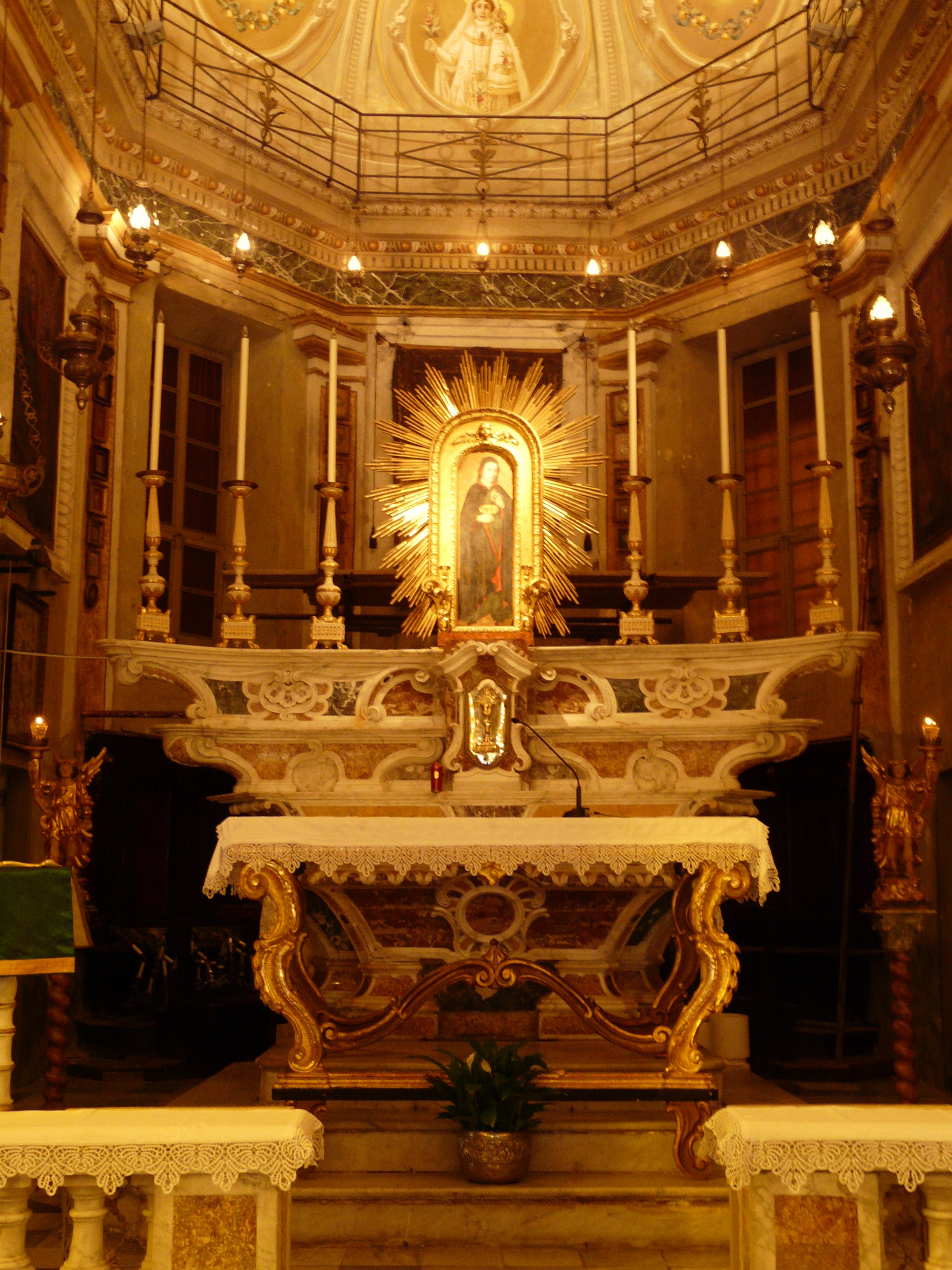 Altare maggiore dell'oratorio di San Bernardo, Santa Margherita Ligure, Liguria, Italia